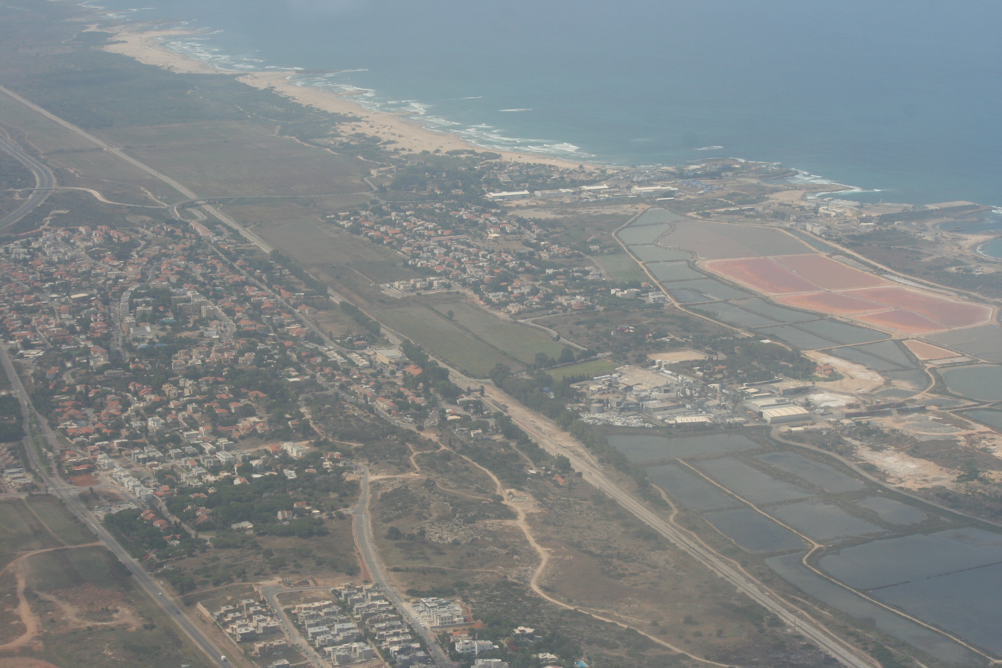 עתלית